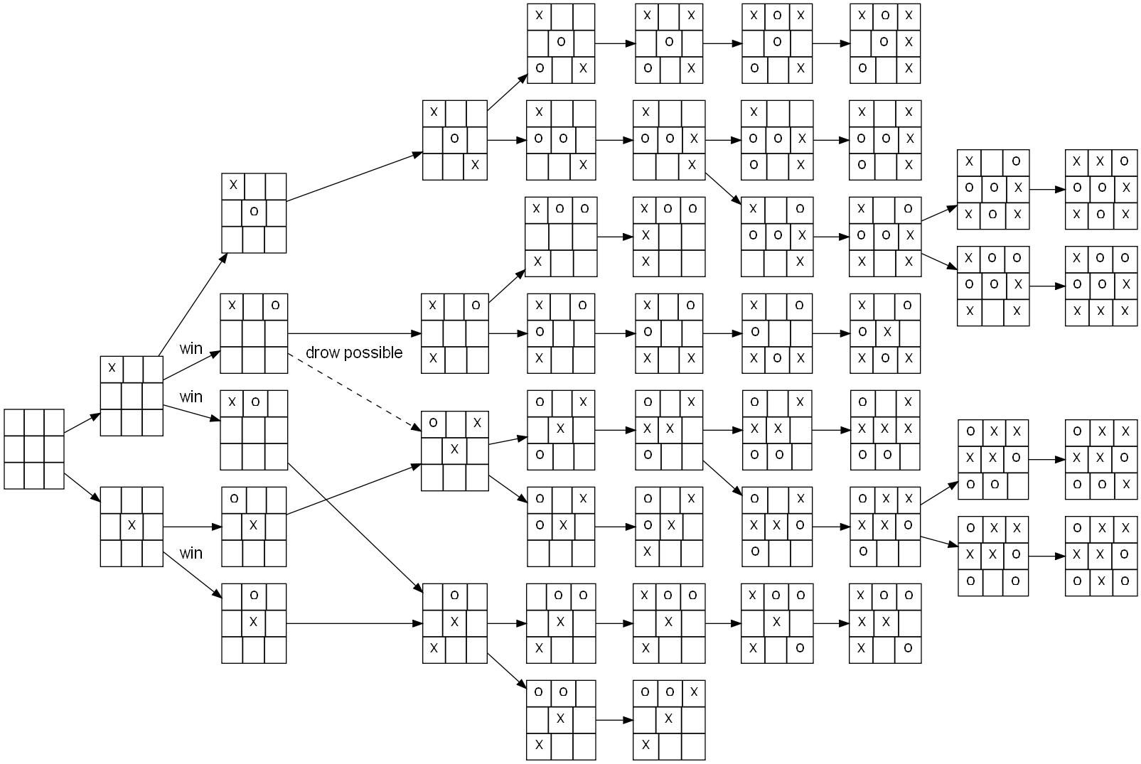 Это полное дерево игровых ситуаций в крестики-нолики 3х3, первым ходит "х", действуя максимально рационально (по алгоритму), "о" действует как угодно, причём, представлено по одной ситуации: для максимально-рационального хода и для какого-либо другого.